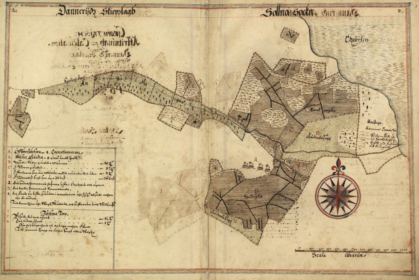 Solna socken Järva Övre nr 1-2